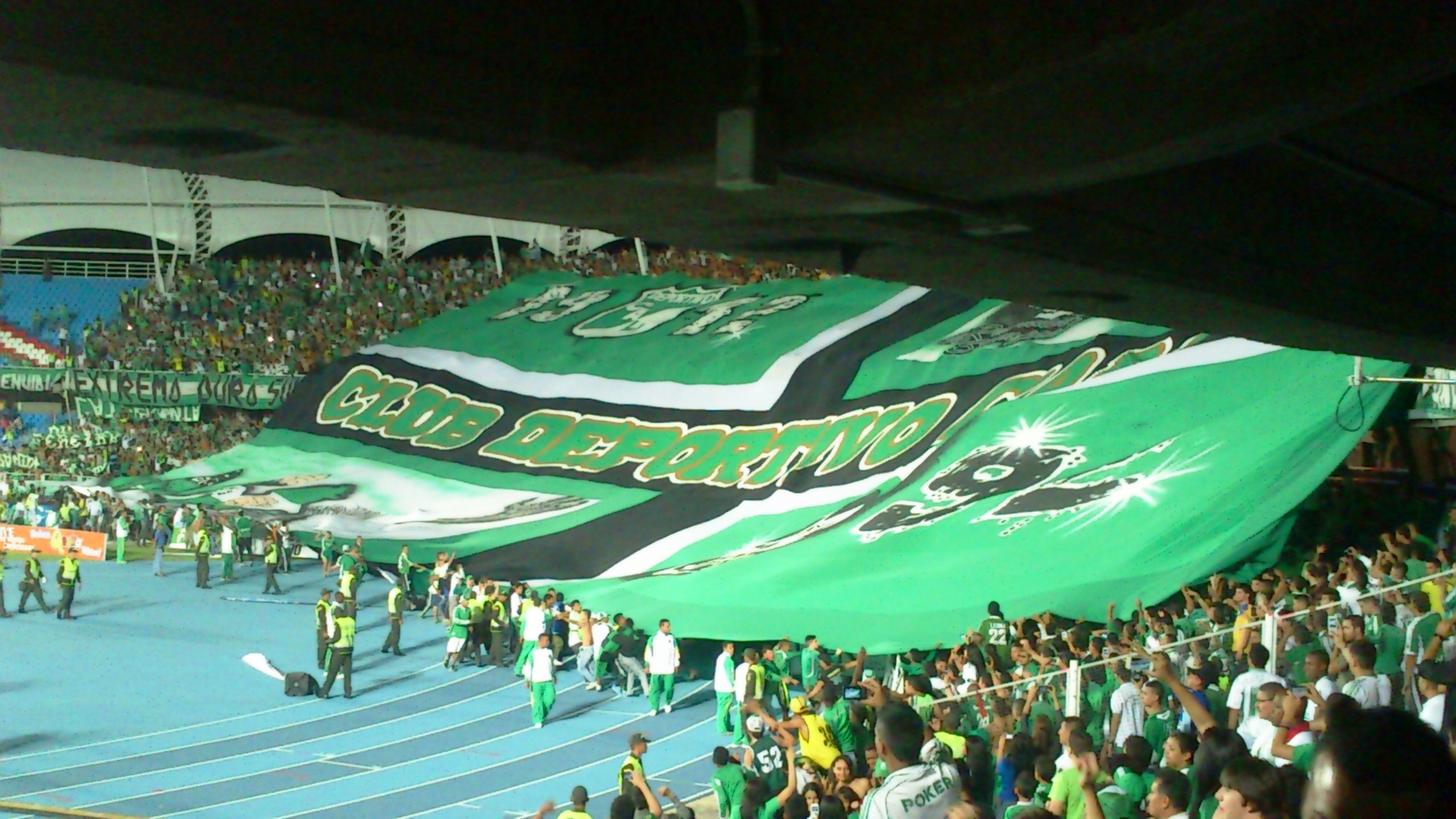 Partido por la fecha 3 de los cuadrangulares semifinales del Torneo Apertura 2013. Deportivo Cali 1 - 0 Millonarios.